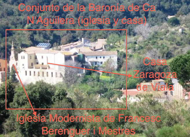 Conjunto de la Baronía de Ca N'Aguilera, la casa principal (original del sXV) y la ermita modernista de Francesc Berenguer i Mestres